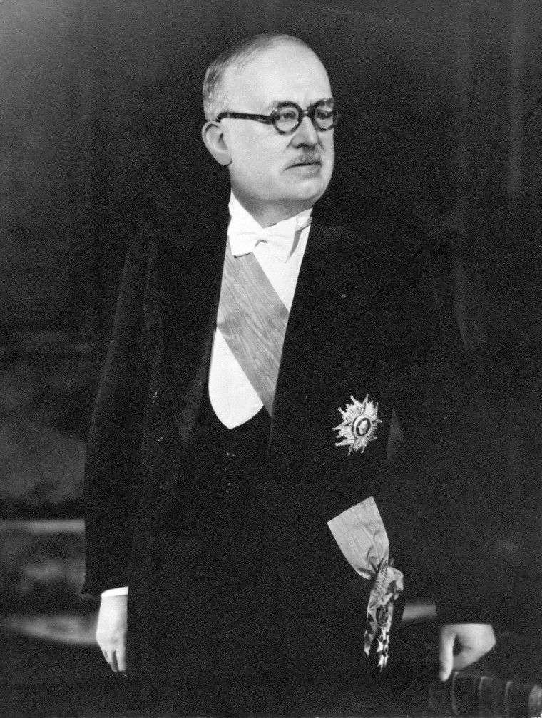 Portrait officiel du président de la République française (1947-1954) Vincent Auriol.